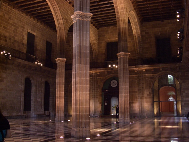 Llotja de Mar de Barcelona